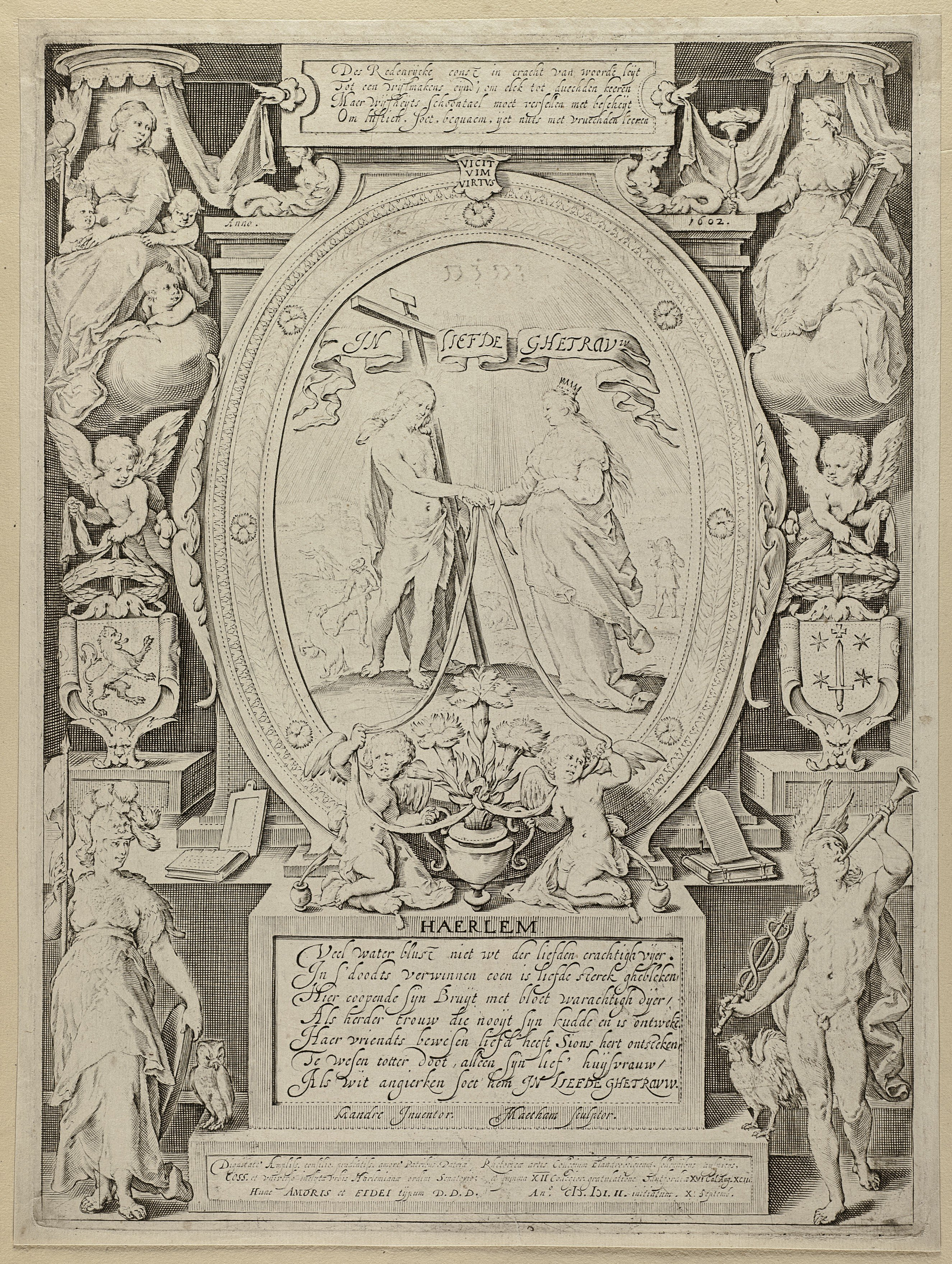 CollectieVoorhelm SchneevoogtInventarisnummerNL-HlmNHA_1477_53010807BeschrijvingBlazoen van de rederijkerskamer De witte angieren onder het motto In Liefde Getrouw.In het midden Christus als bruidegom van de Kerk (Ecclesia), omgeven door een ovaal cartouche met bovenaan twee allegorische figuren met een paar in elkaar geslagen handen en een brandend hart als attributen (Trouw en Liefde). Onderaan Minerva (links) en Mercurius (rechts).Gravure door Jacob Matham naar ontwerptekening van Karel van Mander, met Nederlandse opschriften, gesigneerd en gedateerd.FotonummerNL-HlmNHA_1477_53010807DocumenttypeHistorieprenten, tekeningen en foto'sVervaardigerMatham, Jacob (1571-1631), Mander, Karel van (I) (1548-1606) Begindatum1602Einddatum1602TechniekGrafiek Drukwerk Trefwoordendevotionele voorstellingen, personificaties LiteratuurNew Hollstein Dutch, Jacob Matham, 66